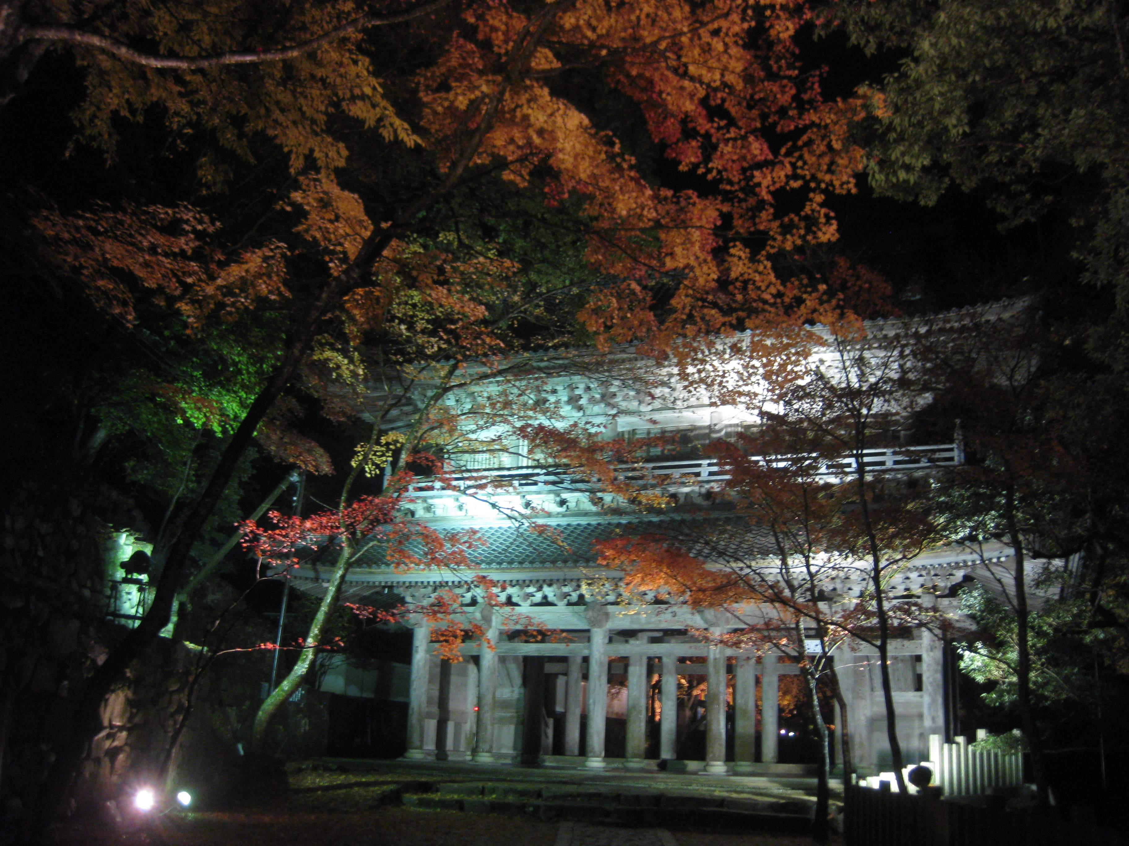 滋賀県東近江市の永源寺紅葉ライトアップ。山門前。